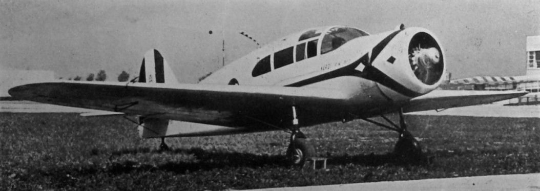 Nardi FN.310 quadriposto, monomotore monoplano ad ala bassa Licensing Categoria:Immagini di aeroplani